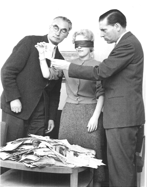 Suomen Kuvalehden päätoimittaja Ensio Rislakki (vas.) ja Leo Tujunen (oik.) arpomassa lukijakilpailun voittajaa.